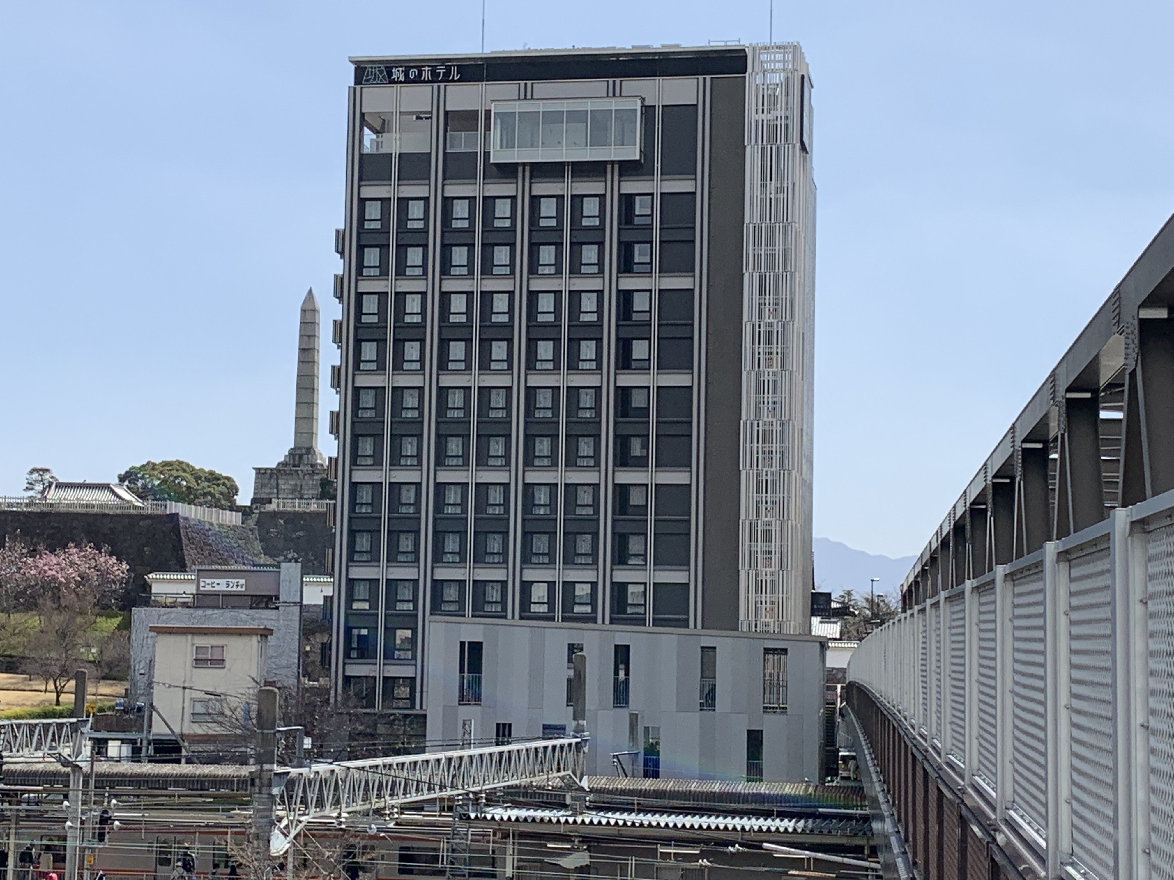 甲府城に隣接する形で建設されているホテル